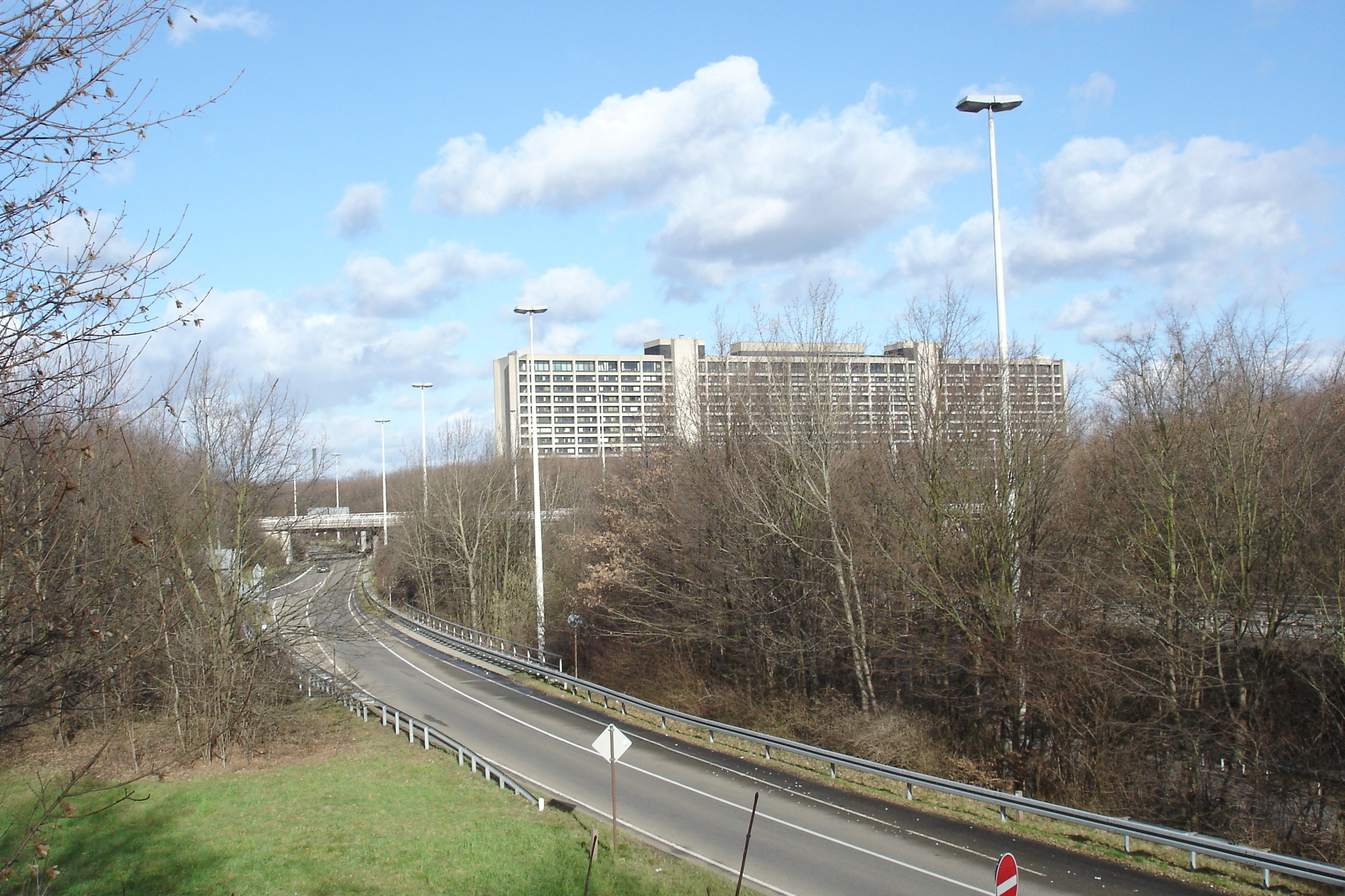 Zentrale der Deutschen Bundesbank in Frankfurt am Main